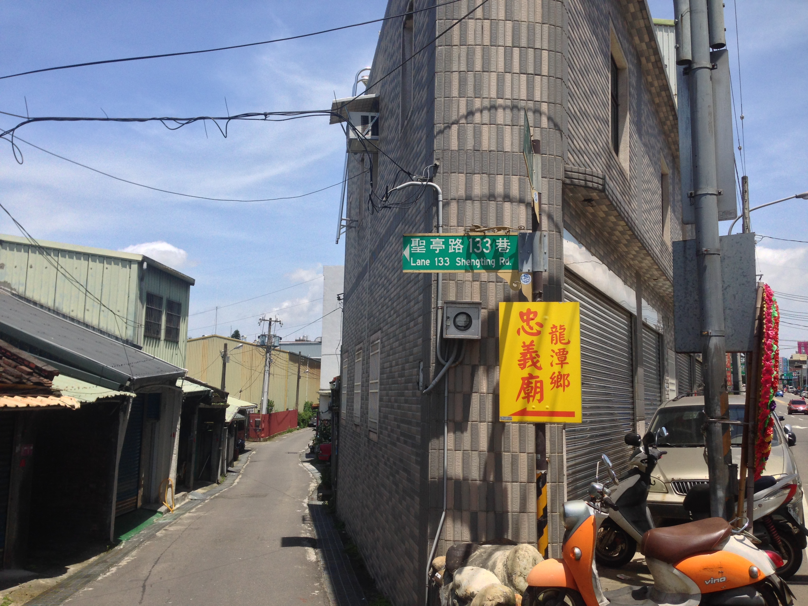 七十三公廟的巷弄入口。